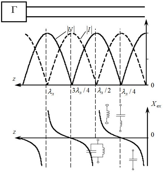 Эпюры напряжения, тока и входного сопротивления в короткозамкнутой линии